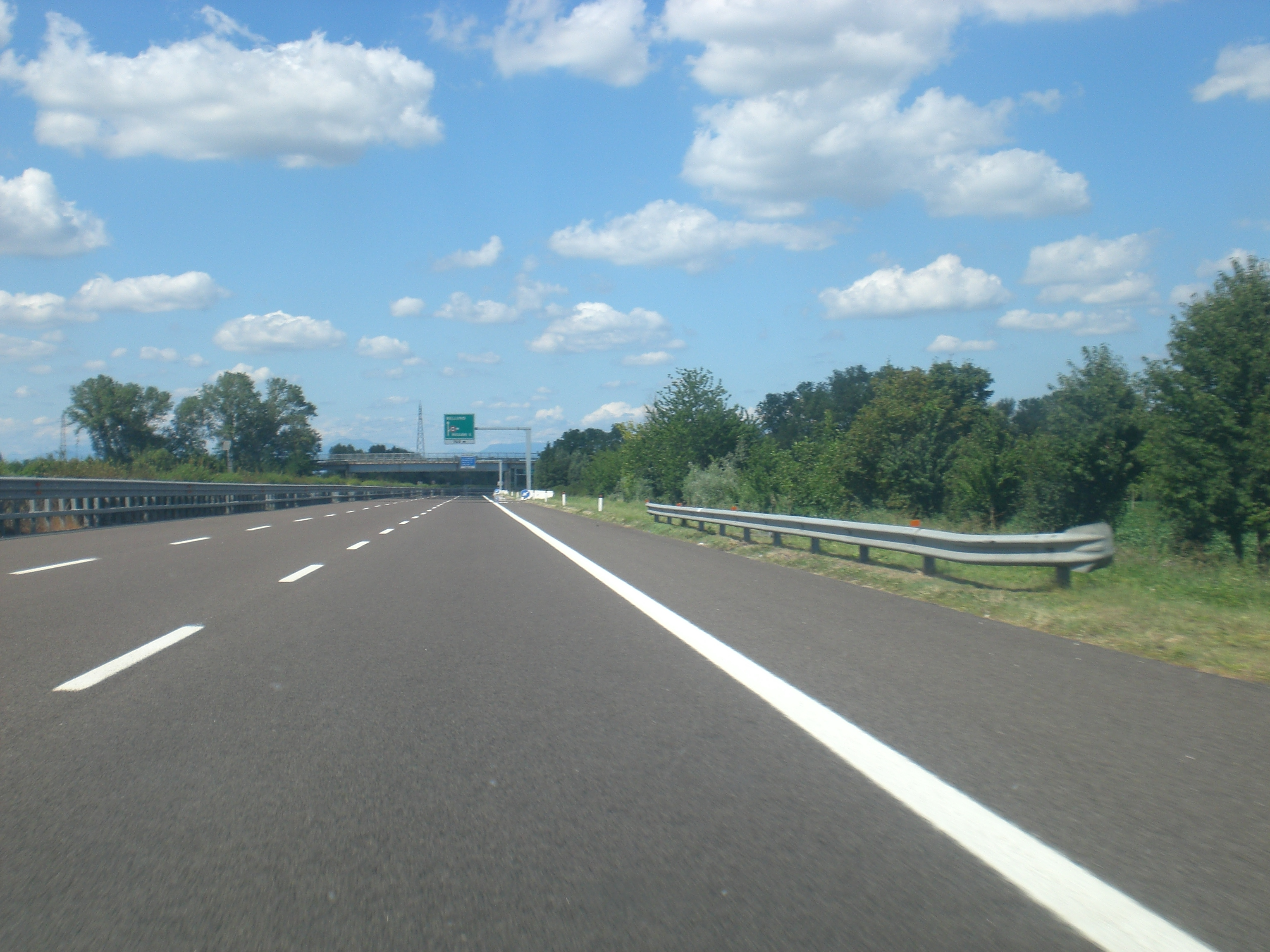 A27